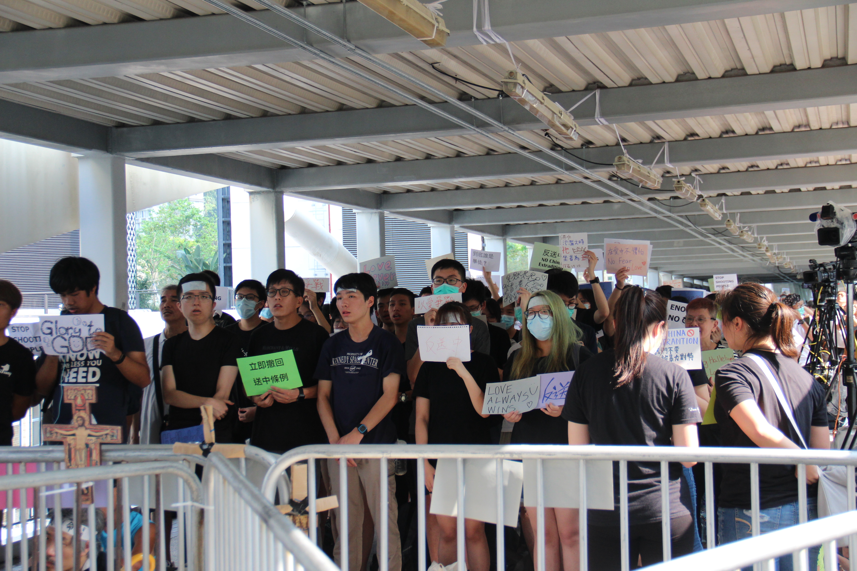 2019年6月14日，香港宗教團體人士面對警察唱聖歌。（美國之音記者申華拍攝）